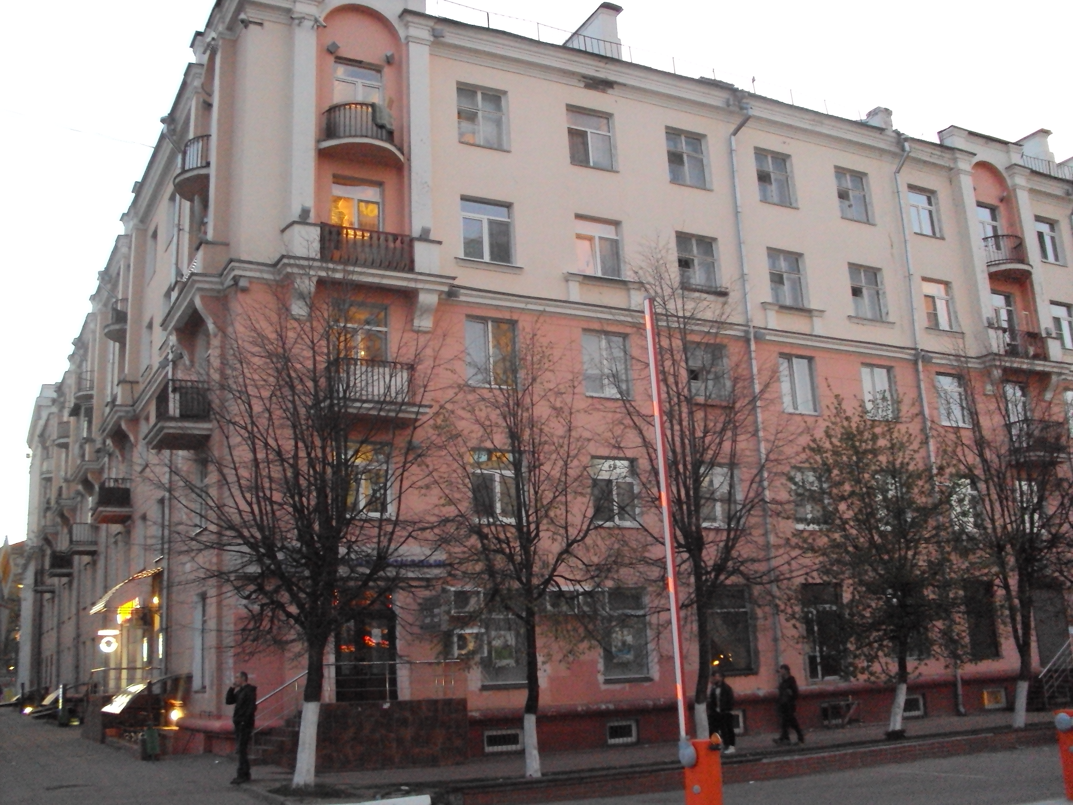 Россия. Балашиха. Улица Парковая 5. Дом постройки конца 1930-х. Архитектор А. К. Ростковский.